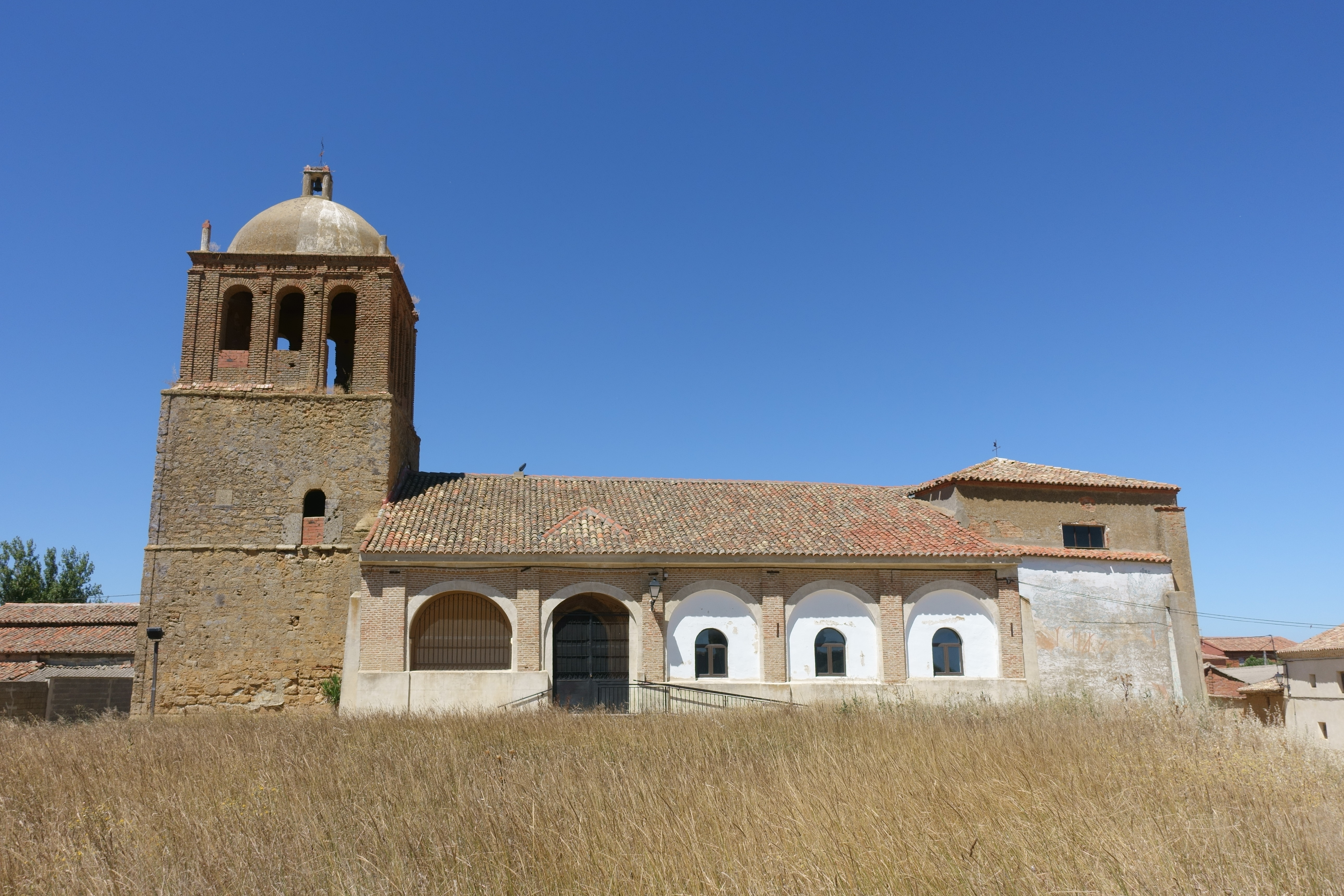 Iglesia de San Nicolás de Bari, Villagómez la Nueva (Valladolid, España).